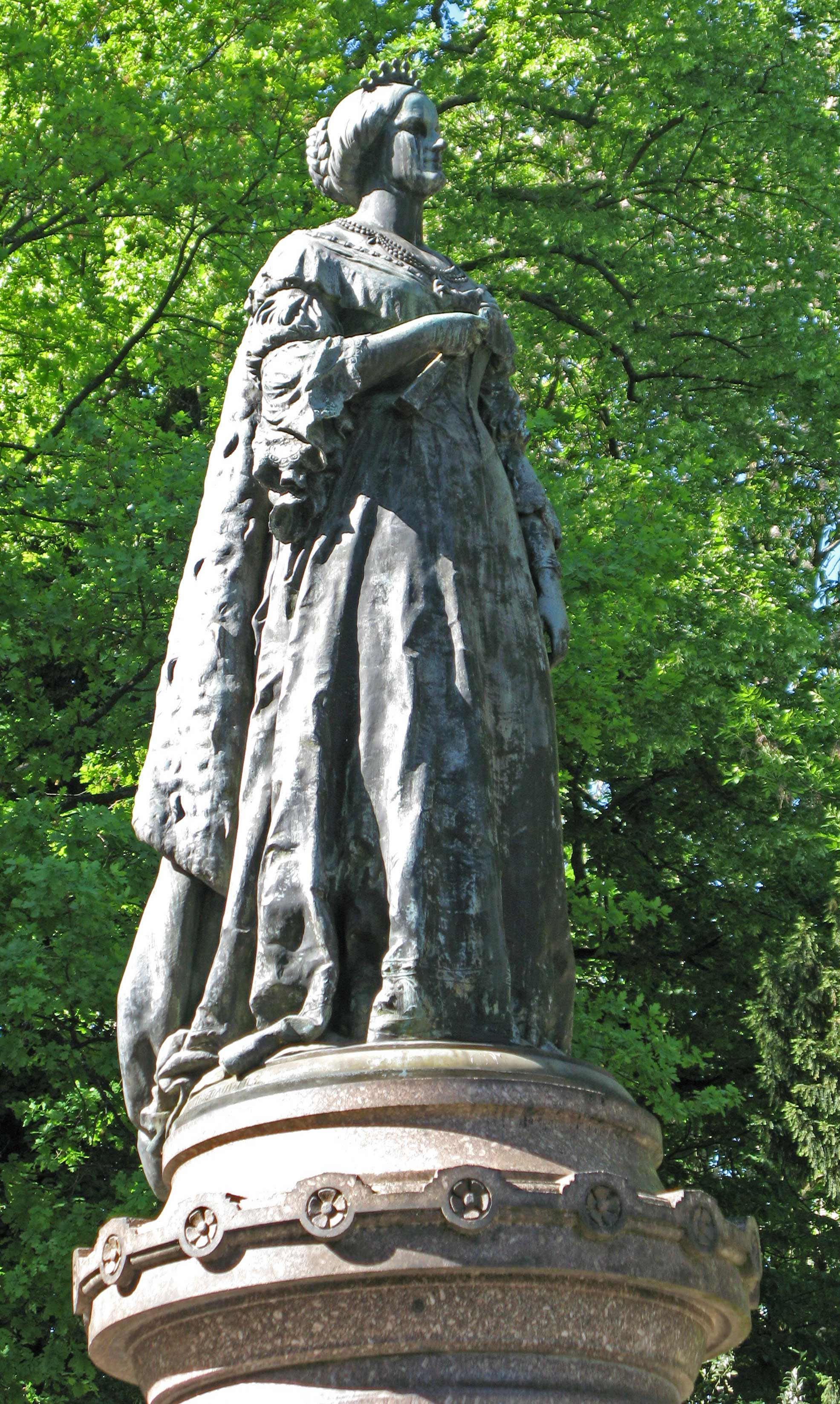 Amalia-Monument Skulptur vum Charles Pêtre (1828-1907)